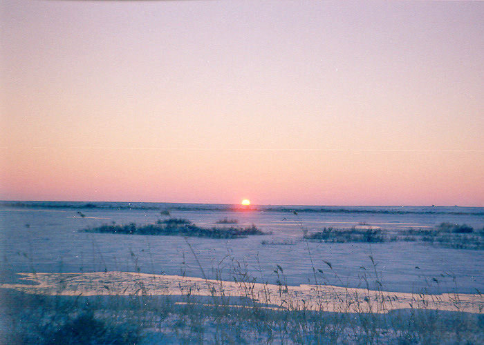 Байконур, рассвет на р. Сырдарья, январь 2001 г.